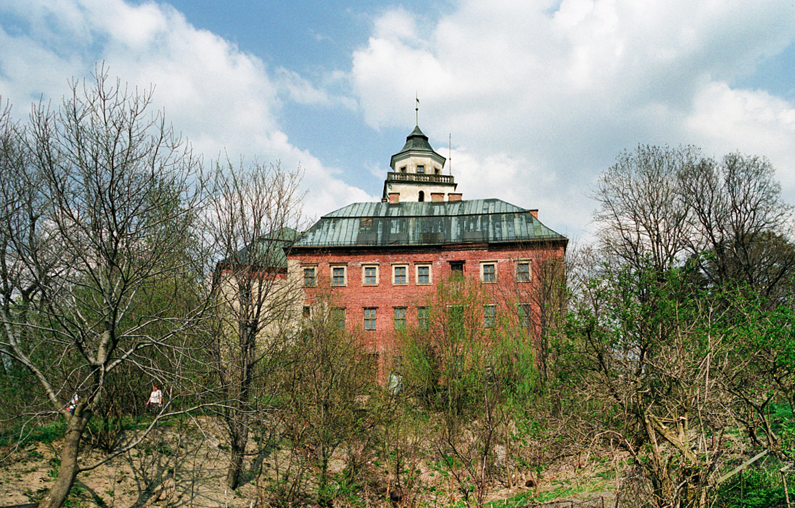 Międzylesie, zamek